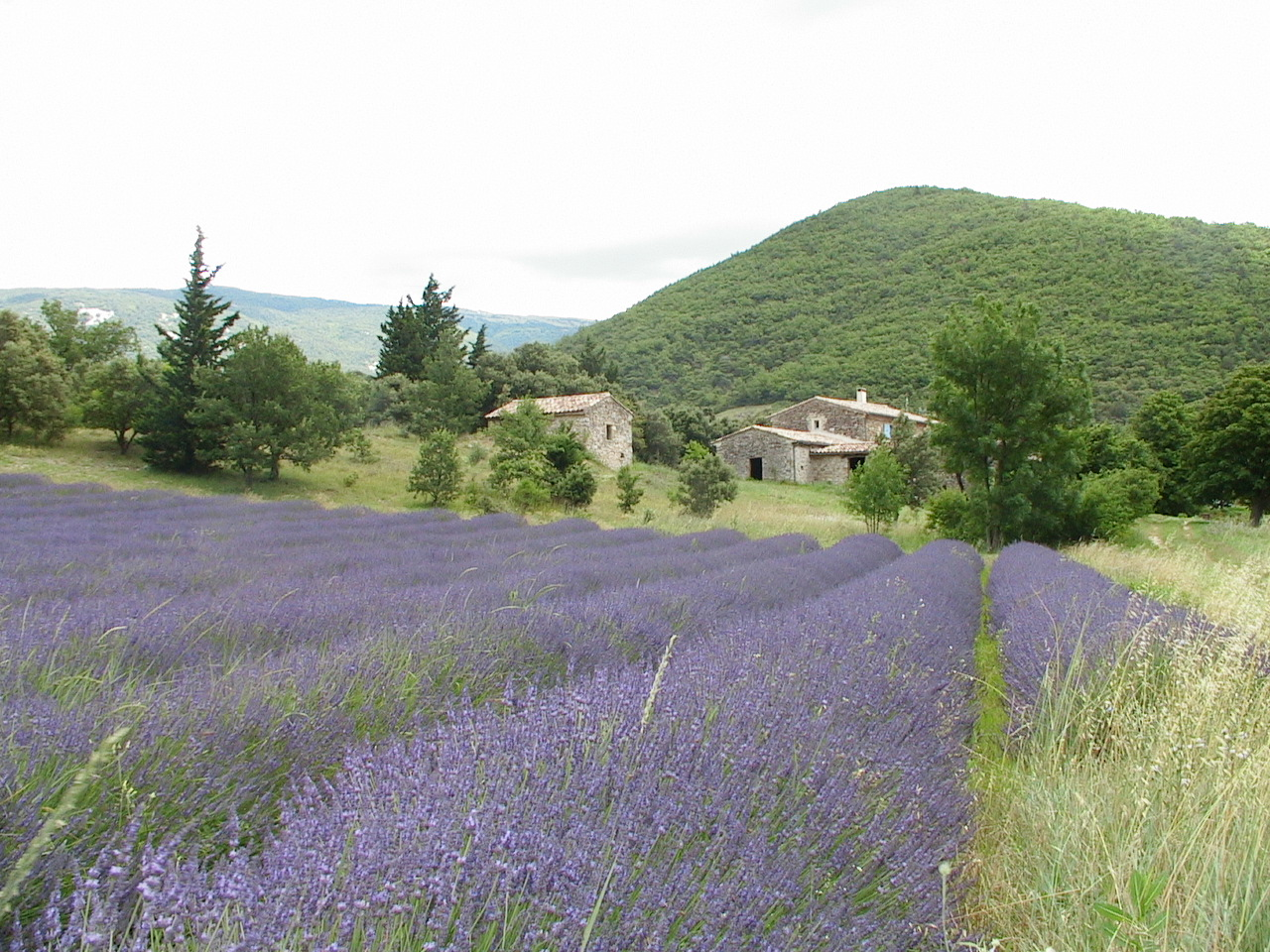 Champ de lavande et ferme isolée à La Roche St-Secret Béconne